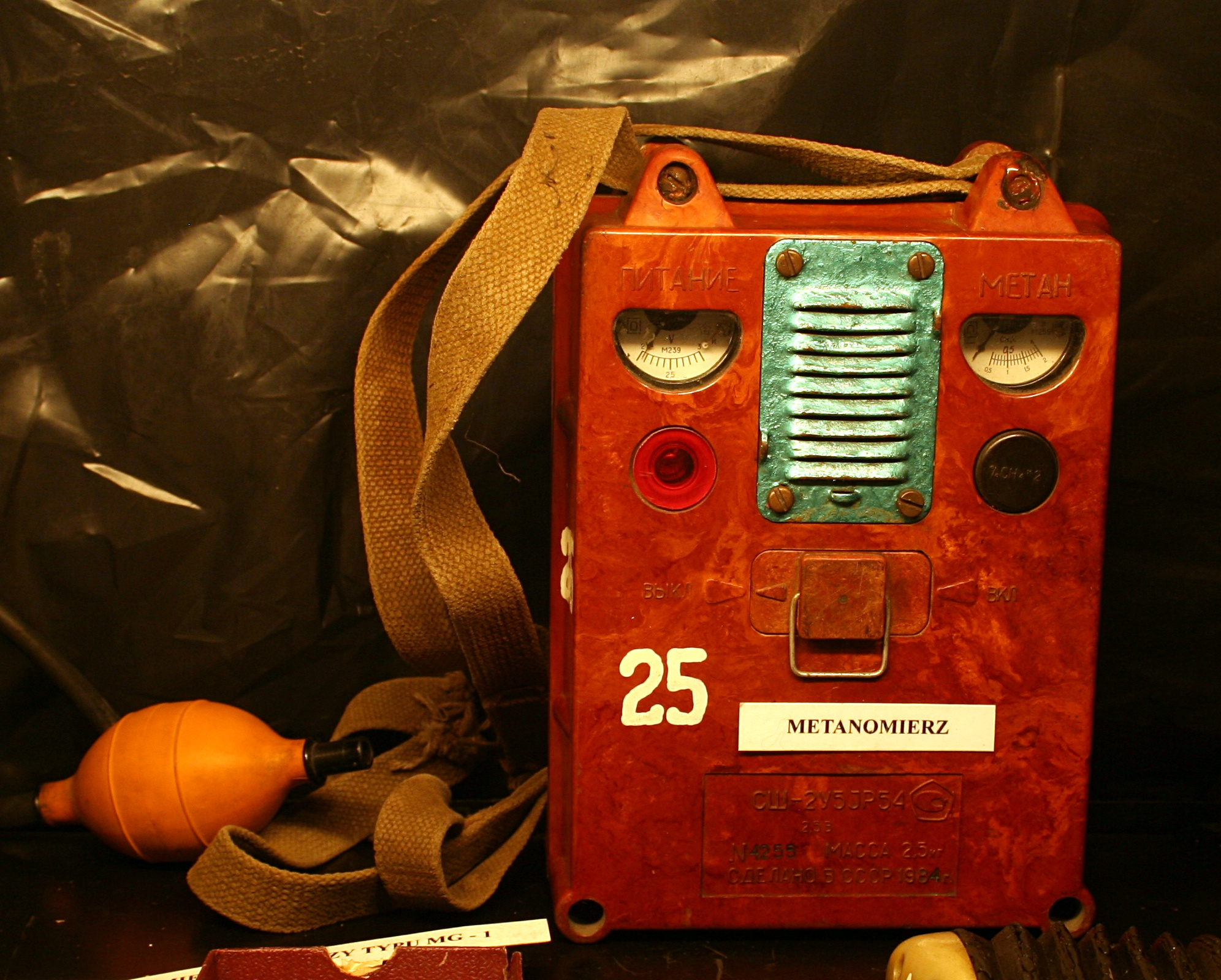 Muzeum w Rybniku podczas Nocy Muzeów. Metanomierz.